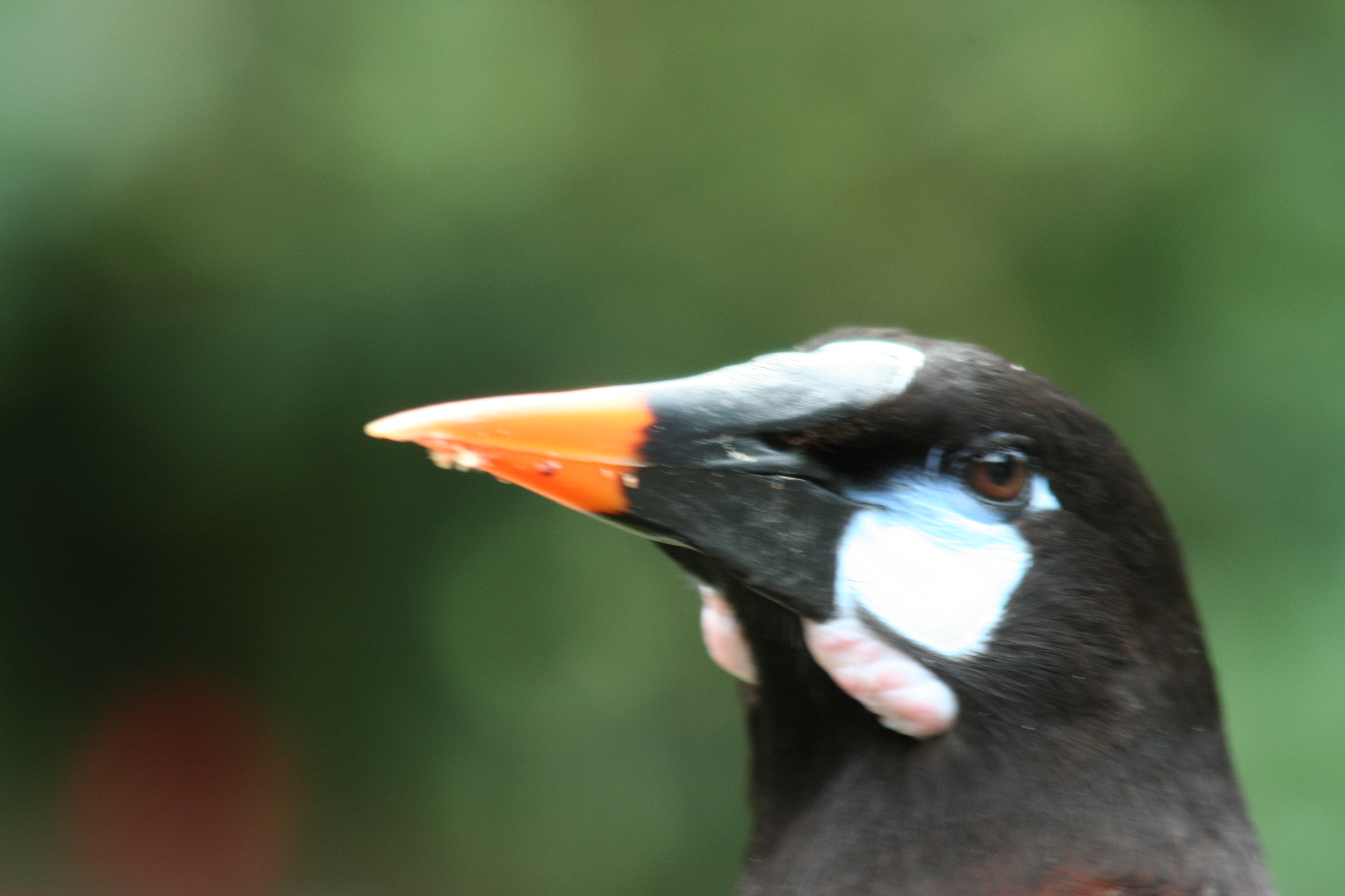 Psarocolius montezuma, Vogelpark Walsrode